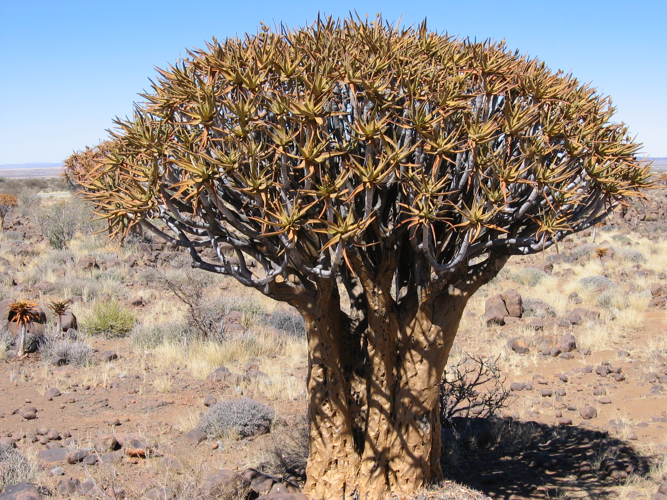 Köcherbaum (Aloe dichotoma) im Köcherbaumwald